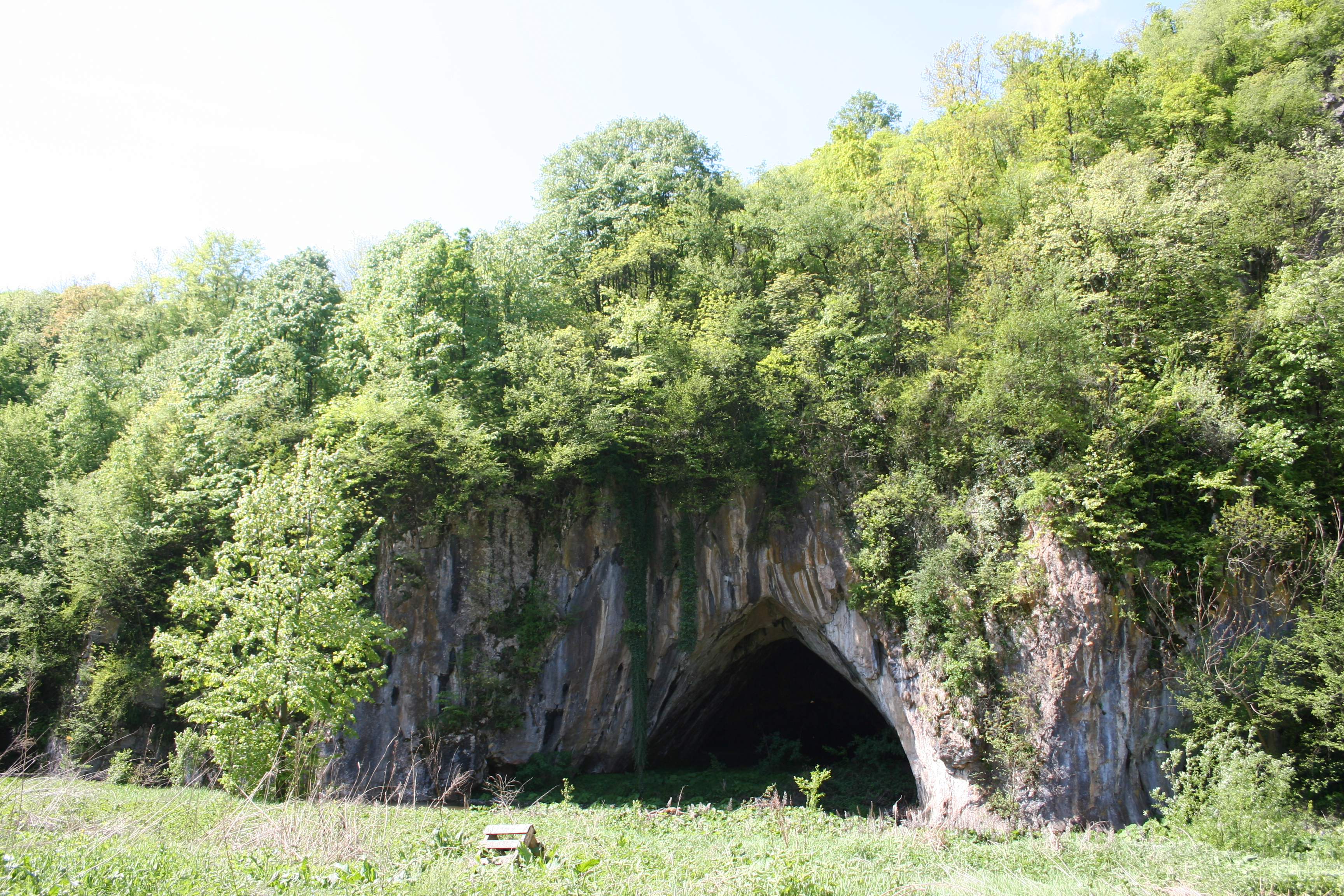 Spomenik prirode Ribnica - Velika ribnička pećina Ово је фотографија заштићеног природног добра у Србији под шифром: СП206 This is a a photo of a natural area in Serbia with ID: СП206